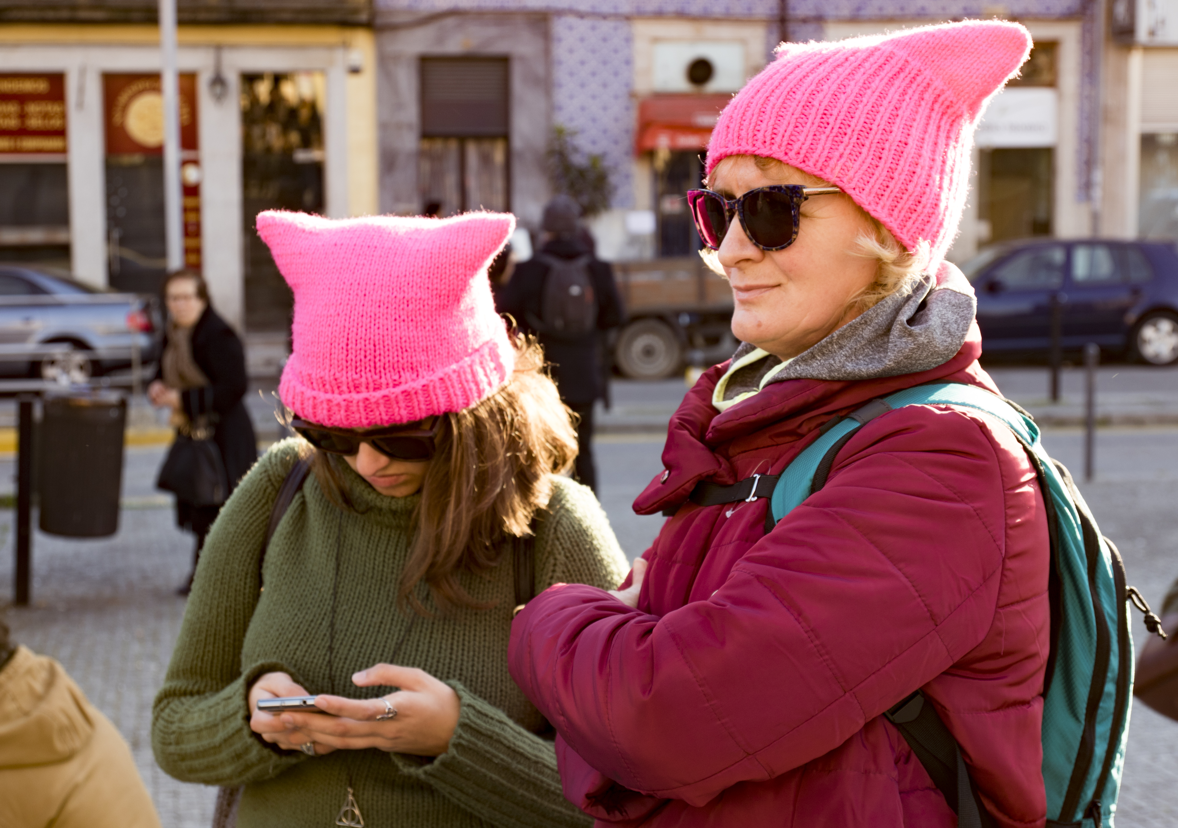 DY5A0837